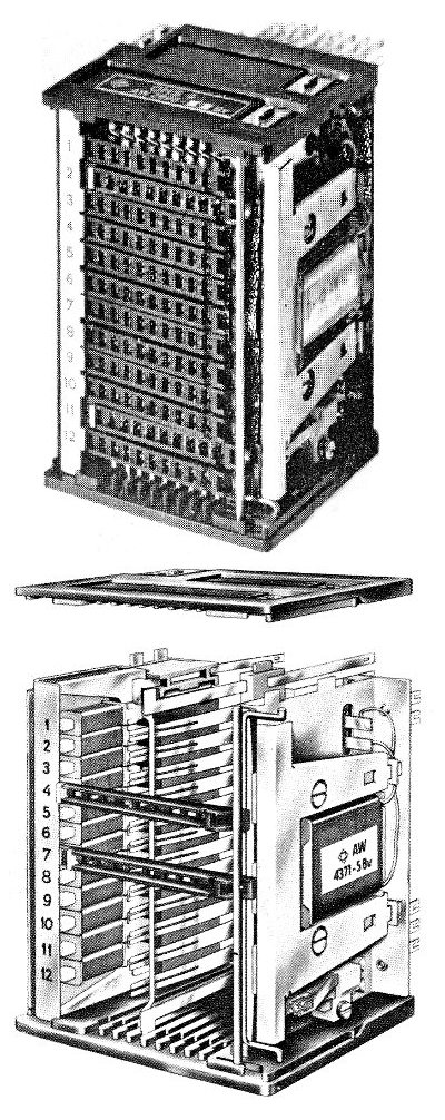 Ordinatenhaftschalter, ein Koppelelement in der Fernsprechtechnik. Der Ordinatenhaftschalter ist eine Entwicklung der Firma Telefunken. Der Haupteinsatzweck war die Durchschaltung der Sprechadern in einer Telefonanlage oder auch in Vorfeldeinrichtungen.